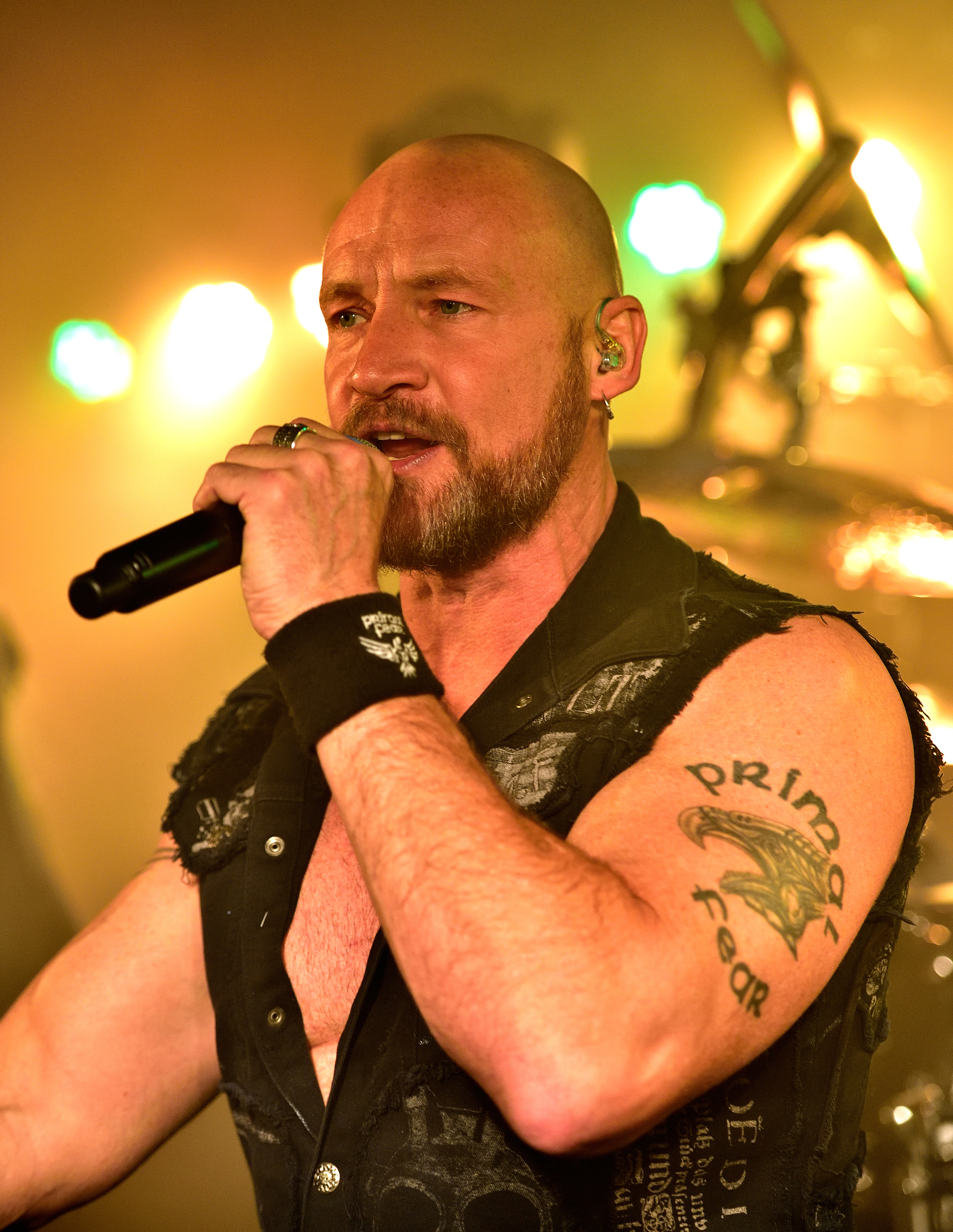 Primal Fear live im Logo Hamburg